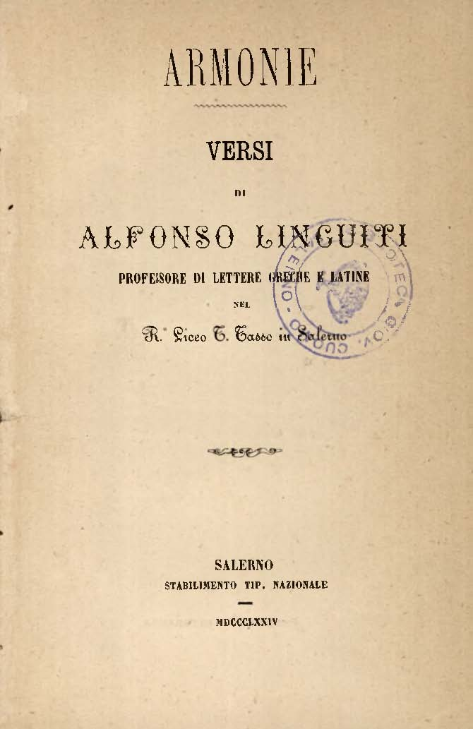 Armonie / versi di Alfonso Linguiti. - Salerno : Stabilimento Tipografico Nazionale, 1874. - XX, 287 p. ; 18 cm